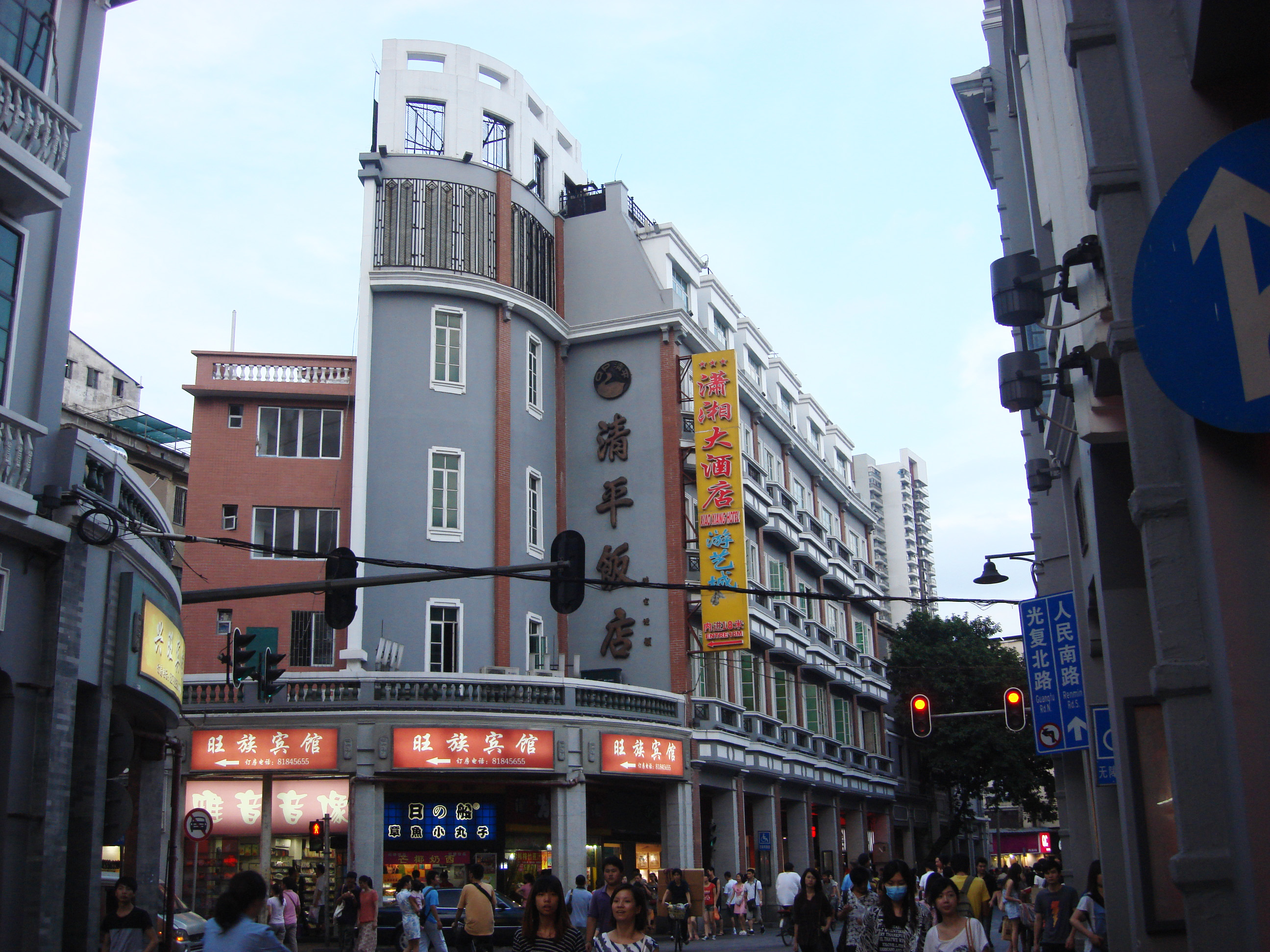 廣州市荔灣區西關清平飯店上九路分店（已結業）